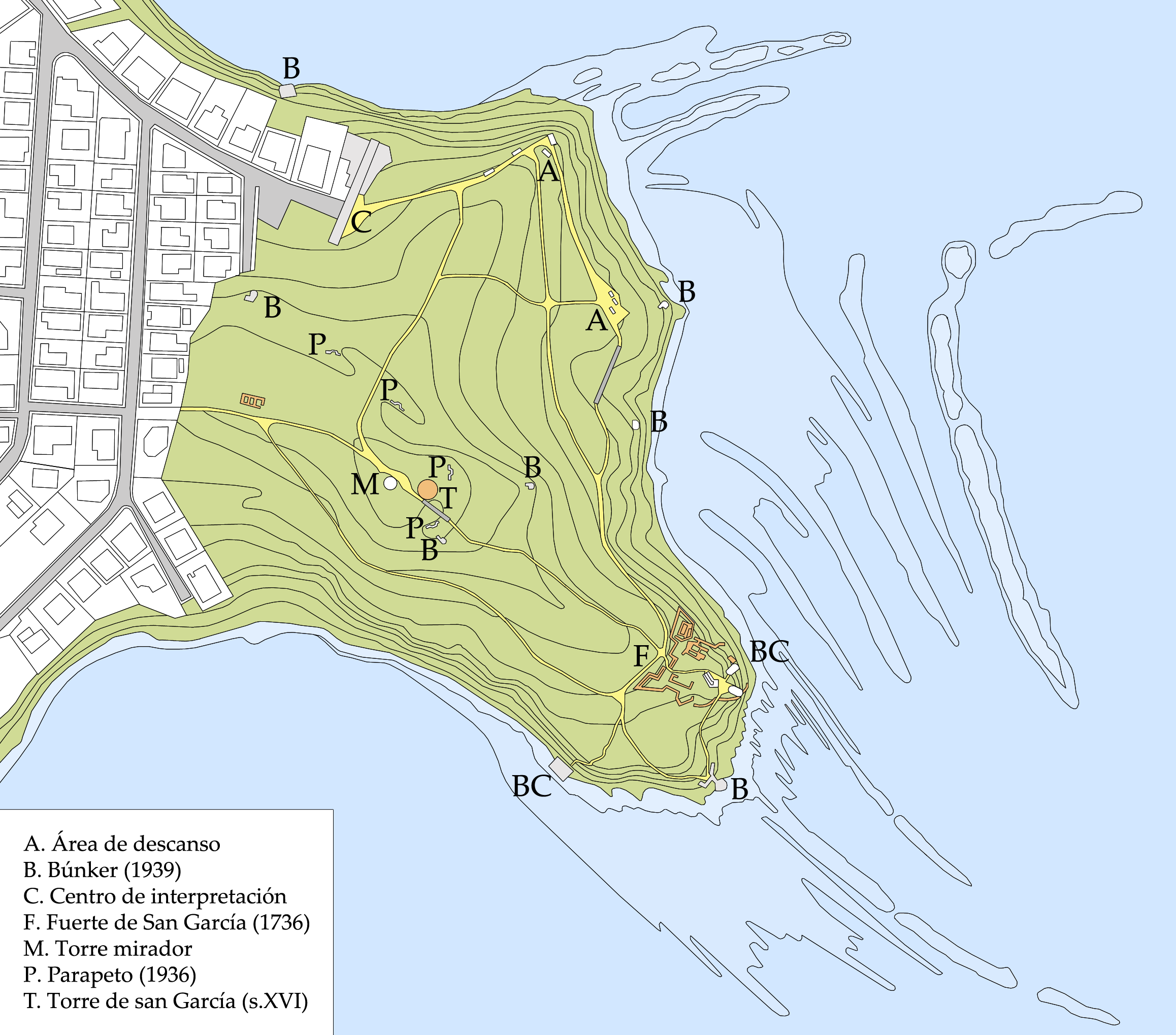 Plano situación del Parque del Centenario de Algeciras (España).